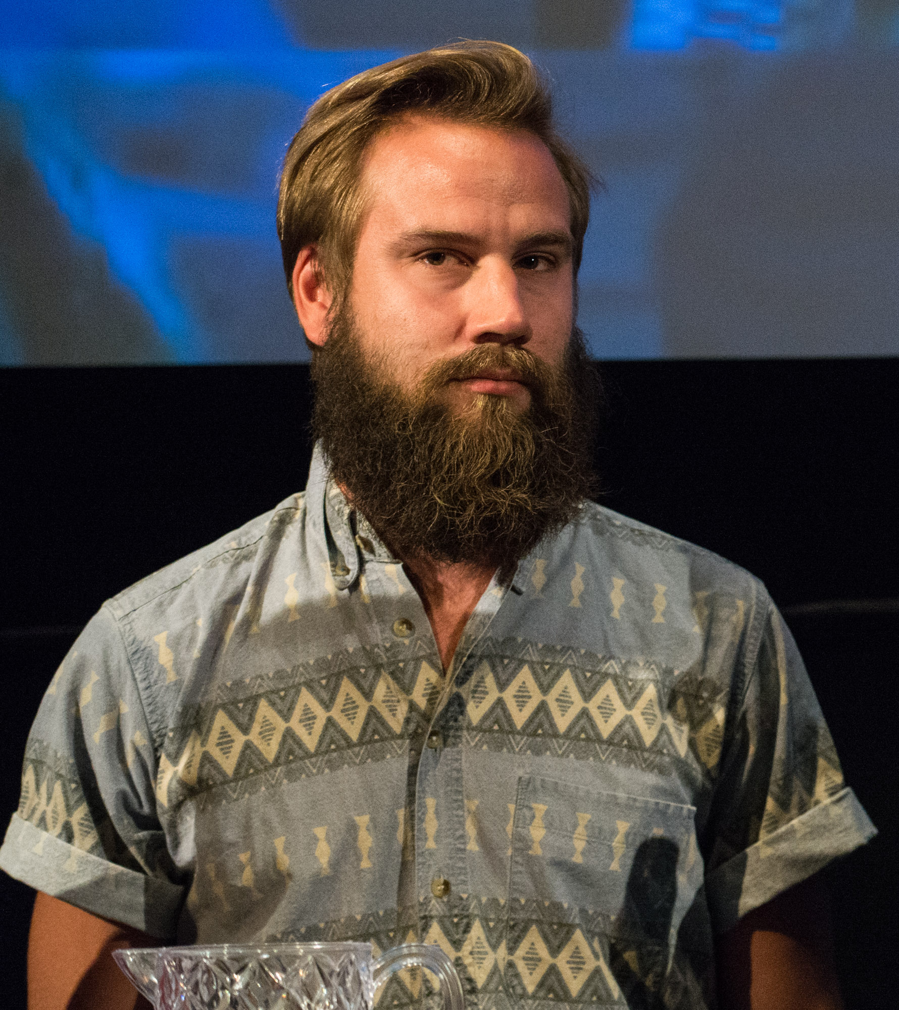 Andreas Öhman under presentationen av den Svenska filmhösten i Filmhuset i Stockholm den 17 augusti 2015.